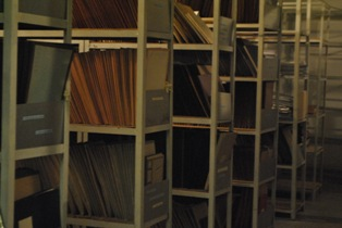 ხელნაწერთა ეროვნული ცენტრის ფონდების მართვის დეპარტამენტი